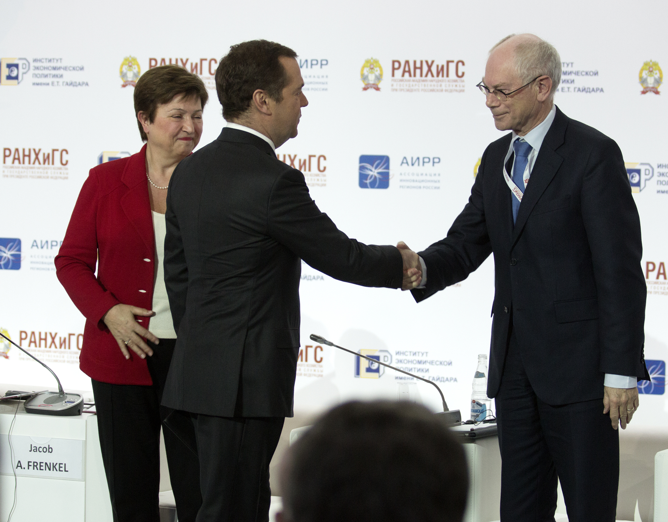 В пленарной дискуссии Гайдаровского форума – 2018 принимали участие: Модератор: Владимир Мау, ректор Российской академии народного хозяйства и государственной службы при Президенте Российской Федерации. Участники: Дмитрий Медведев, Председатель Правительства Российской Федерации; Кристалина Георгиева, главный исполнительный директор Всемирного банка; Иван Крастев, политолог, председатель Правления Центра либеральных стратегий в Софии, научный сотрудник Института гуманитарных наук в Вене; Херман Ван Ромпёй, президент Европейского центра политики, президент Европейского Совета (2009–2014 гг.), премьер-министр Бельгии (2008–2009 гг.); Кай Мюккянен, министр внешней торговли и развития Финляндии; Якоб Френкель, председатель Правления JP Morgan Chase International, председатель Банка Израиля (1991–2000 гг.).